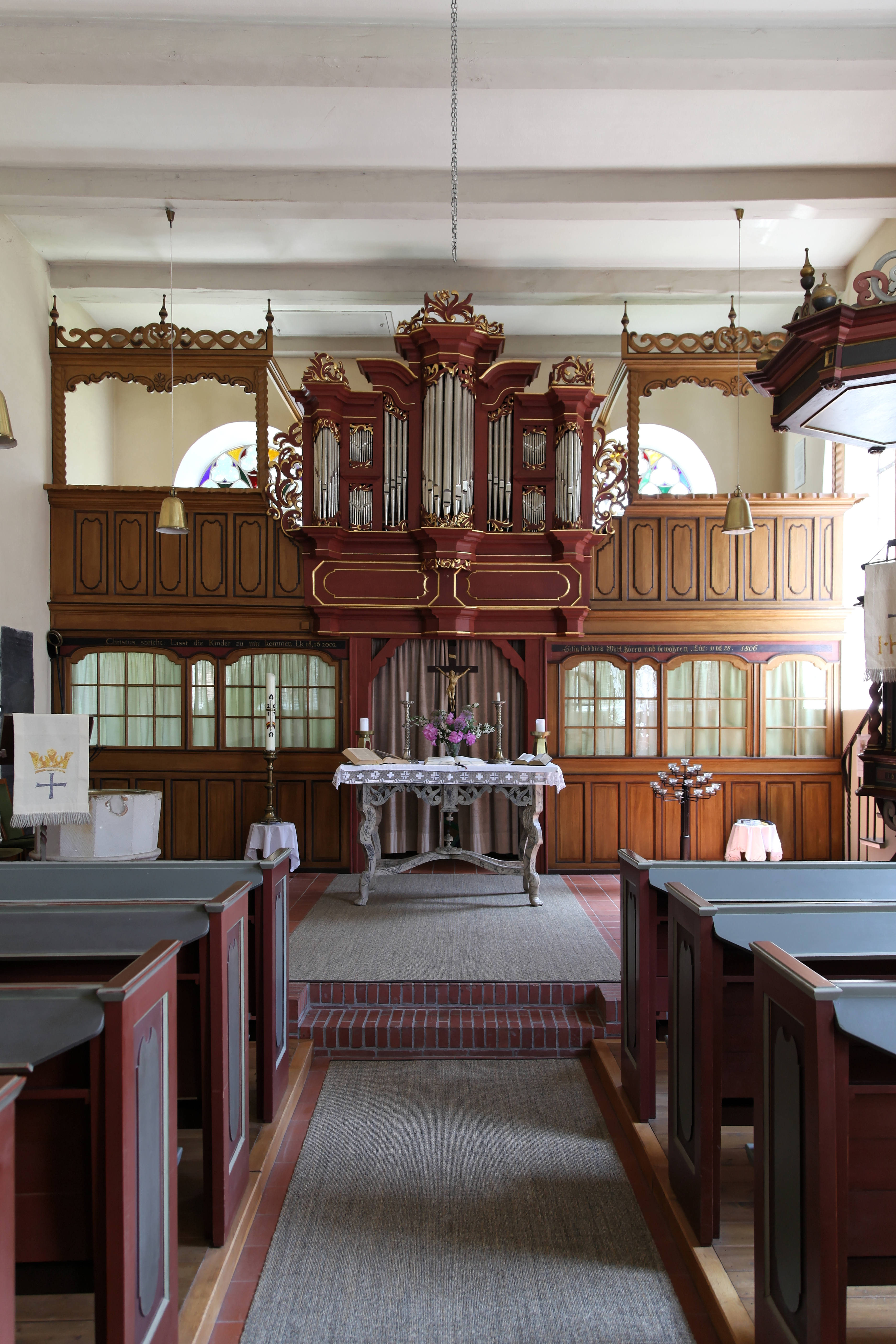 Pogumer Kirche, Kirchring in Pogum, Jemgum